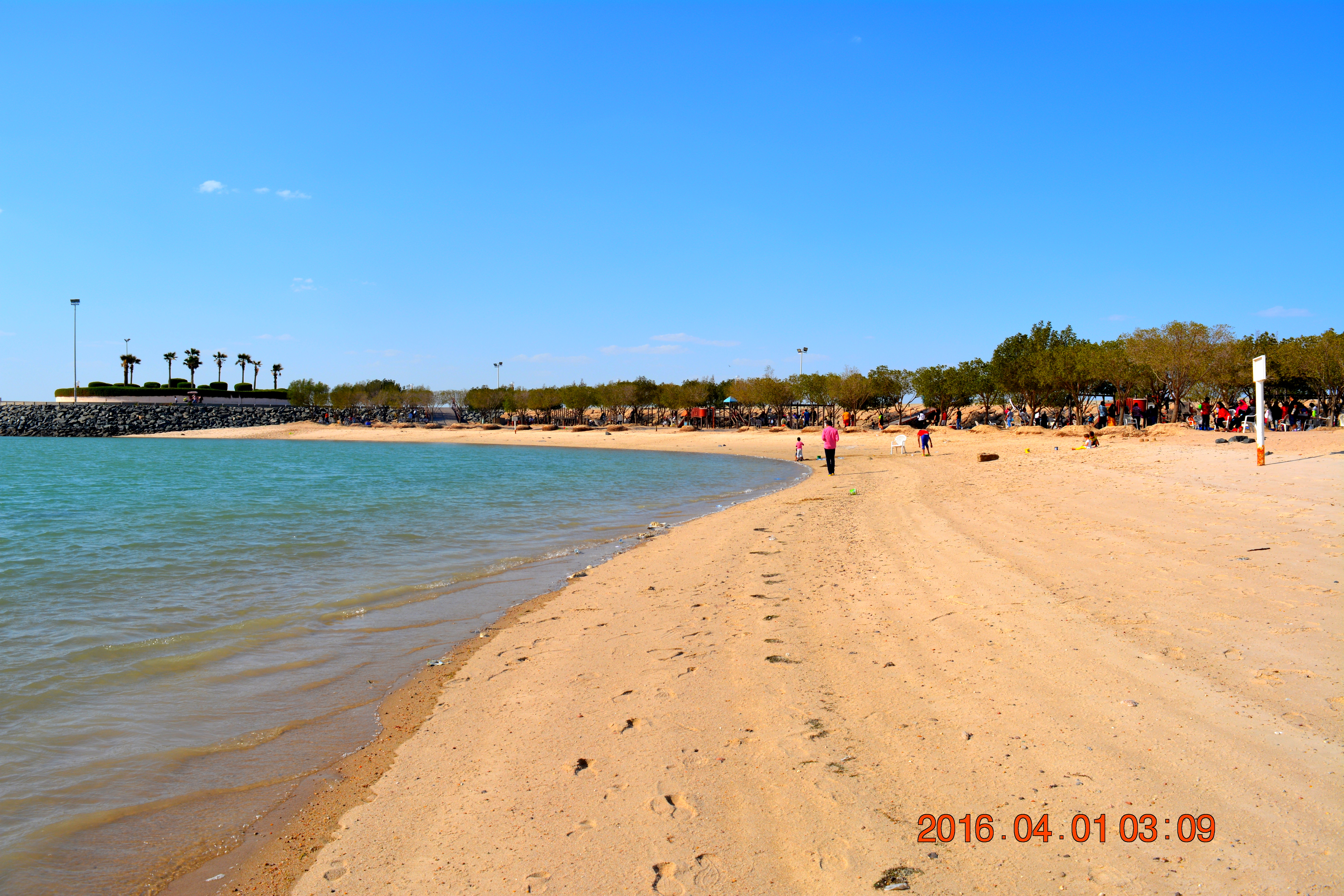 Green Island in Kuwait Green Island is well known as the ideal place for relaxation. It is a popular holiday retreat of Kuwait, which is in fact, a reclaimed land, transformed into an artificial island. green island kuwait The Green Island is located along the coastline, extending from Al-Shiwaikh to Ras Alard, spanning an area of 785,000 square meters. It is surrounded by natural rocks brought from Al-Fujairah Emirates. In fact, even the sands at the beaches of the Green Island is said to have been imported from other countries. Established on 22nd February 1988, and owned by T.E.C, the island includes about 50,000 coloured shrubs and seedlings planted here, and with all the colours and greeneries, it doesn’t render the feel of being in a desert country. On the eastern side of the island, is a swimming pool with a depth of 2.5meters to 3meters. Green Island offers a range of entertainment options including an amphitheatre with seating capacity for at least 700 people. The island also includes a 35mts tall tourist tower, with an overhead water tank. On standing atop the tower, visitors can catch a glimpse of the whole island. The tower includes a Kid’s Castle, with several rooms, corridors, channels, spiral stairway and waterfalls. There is a restaurant on either side of the island, and a well-equipped service center. There is plenty of space and options to play games with family, including Soap-Football, inflatable bouncing castles, playground for kids, options to train ride, bicycle rent, a good walking path, and above all opportunity for an outdoor picnic meal.